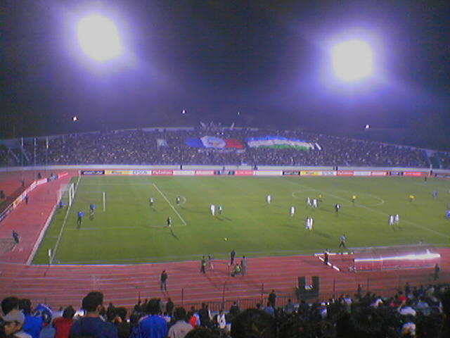 MHSK Stadium, October 22, 2008